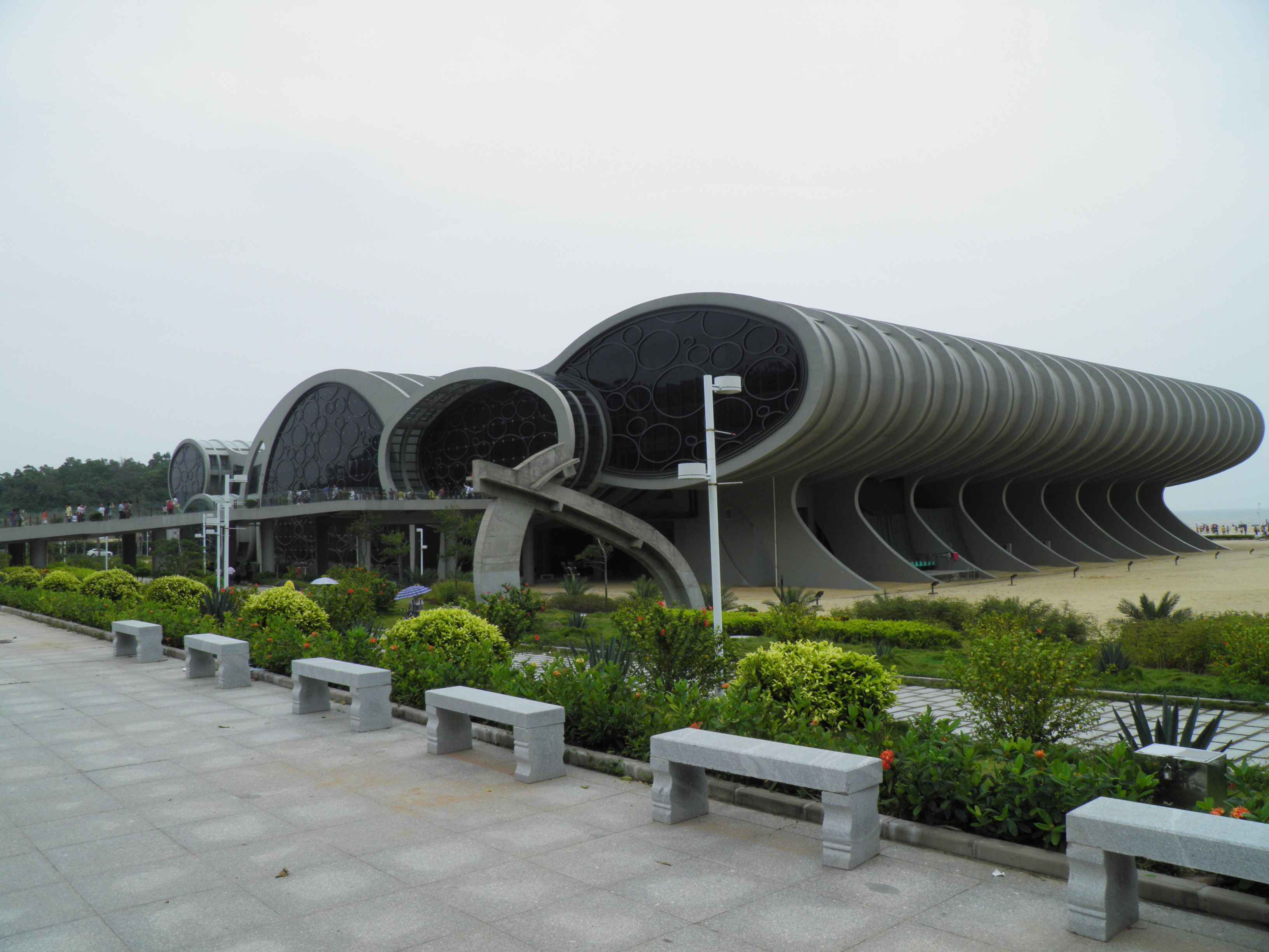 yangjiang